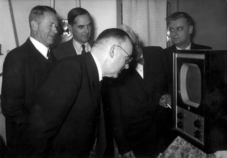 Op 2 oktober 1951 vindt in café De Roozeboom in Bussum de eerste televisie uitzending plaats. De uitzending wordt gevolgd door v.l.n.r. minister Mr. H. Mulderije, Ir. Frits Philips, minister mr. F.G.C.J.M. Teulings, de heer C. de Clercq (AVRO) en de heer van Veen (NCRV)